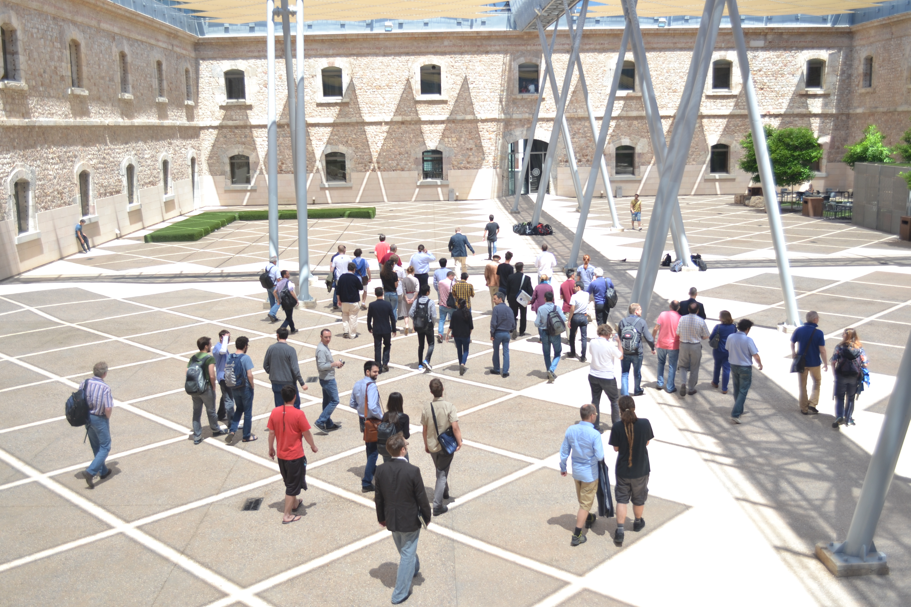 Patio central de la Facultad, antiguo Cuartel de Instrucción de Marinería, inaugurado como centro de la Universidad Politécnica de Cartagena en 2009.